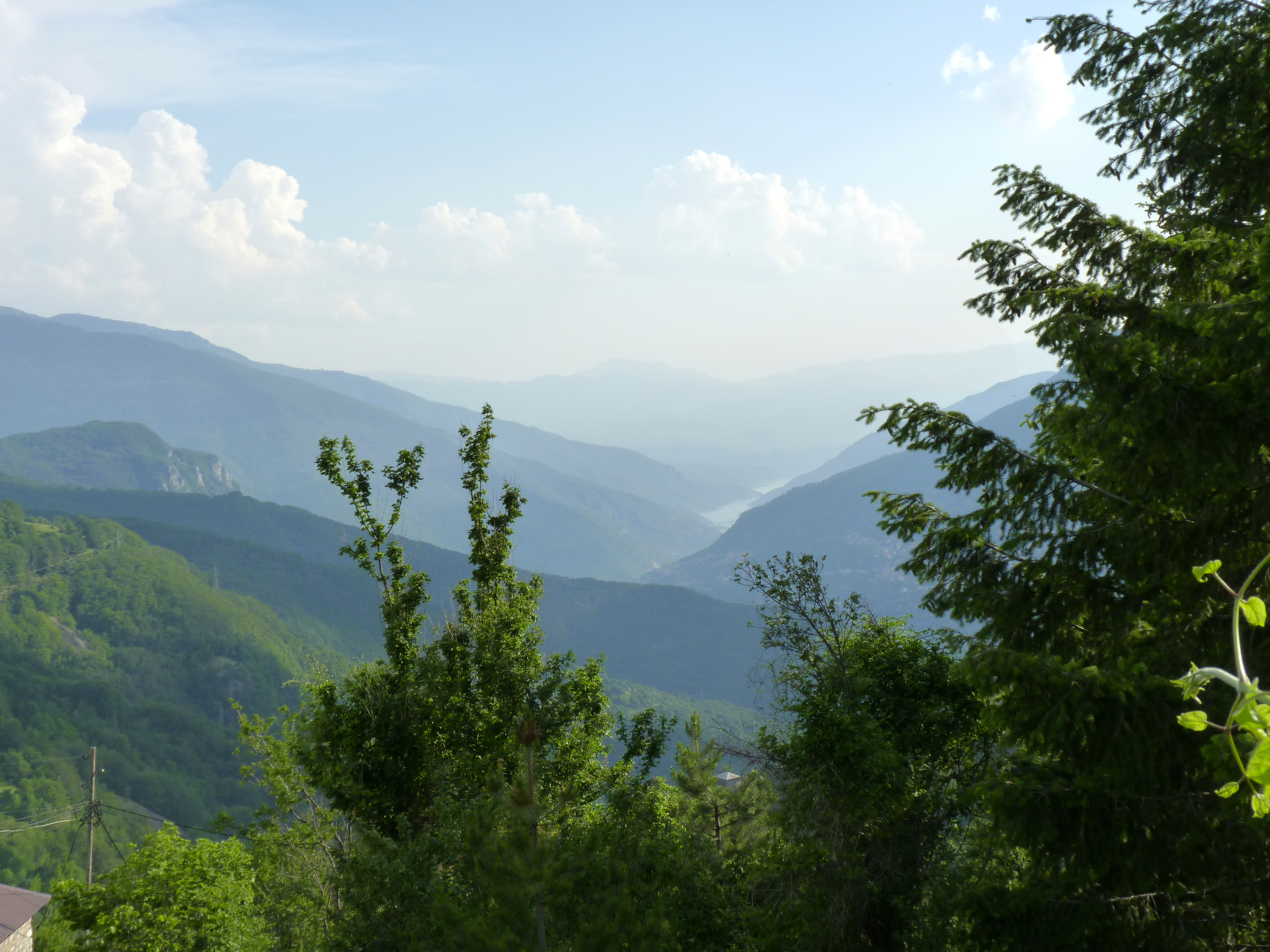 Mavrovo National Park